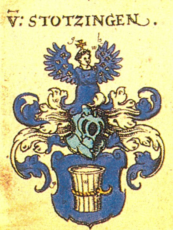 Ritterschaft und Adel in Franken von Stotzingen